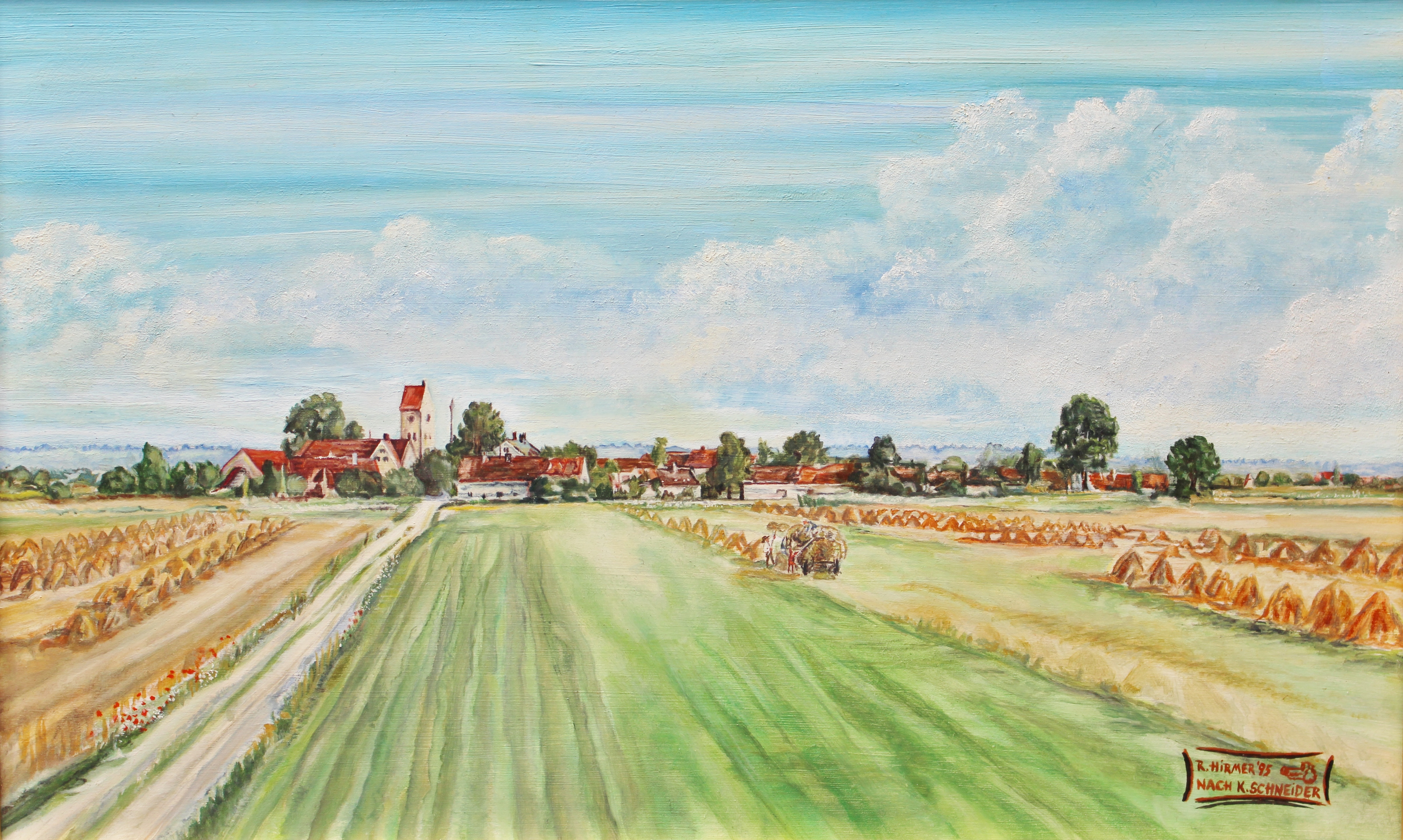 Ansicht von Mitterwöhr, von Norden kommend. Gemalt von Robert Hirmer, nach Konrad Schneider. Gemälde befindet sich in Privatbesitz.